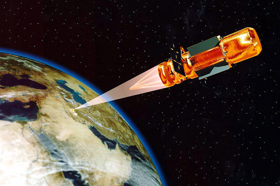 Zukunftsvision des US Space Command für 2020: Ein gerichteter militärischer Hochleistungs-Laser im All zerstört ein terrestrisches Ziel.